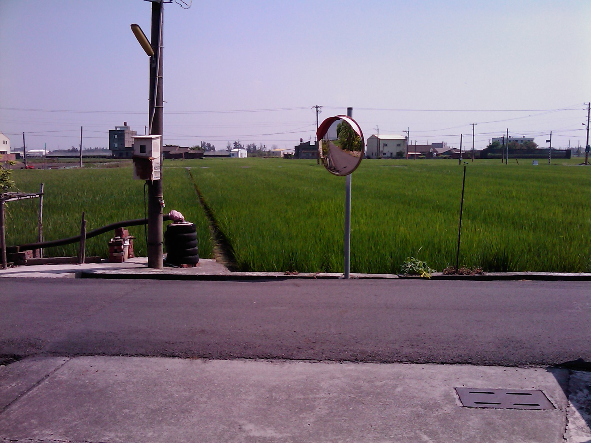 504, Taiwan, 彰化縣秀水鄉金興村